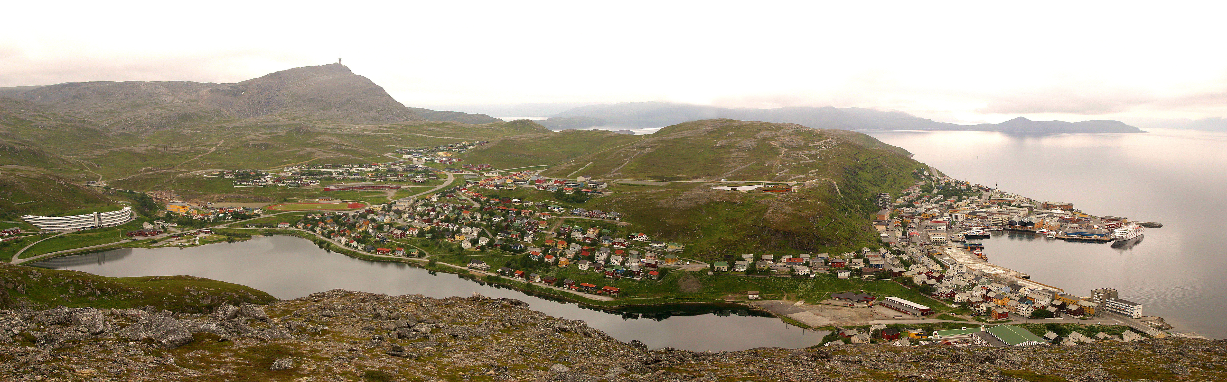 Hammerfest, Finnmark, Norway. Photo: Per Harald Olsen